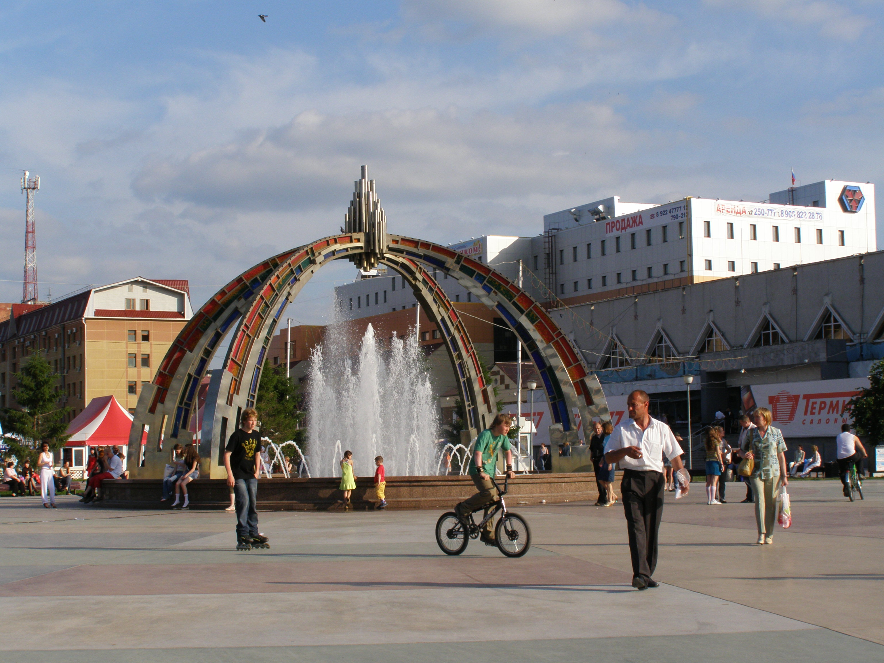 Fontano sur Placo de Unueco kaj Konsento. Tjumeno, Rusio.